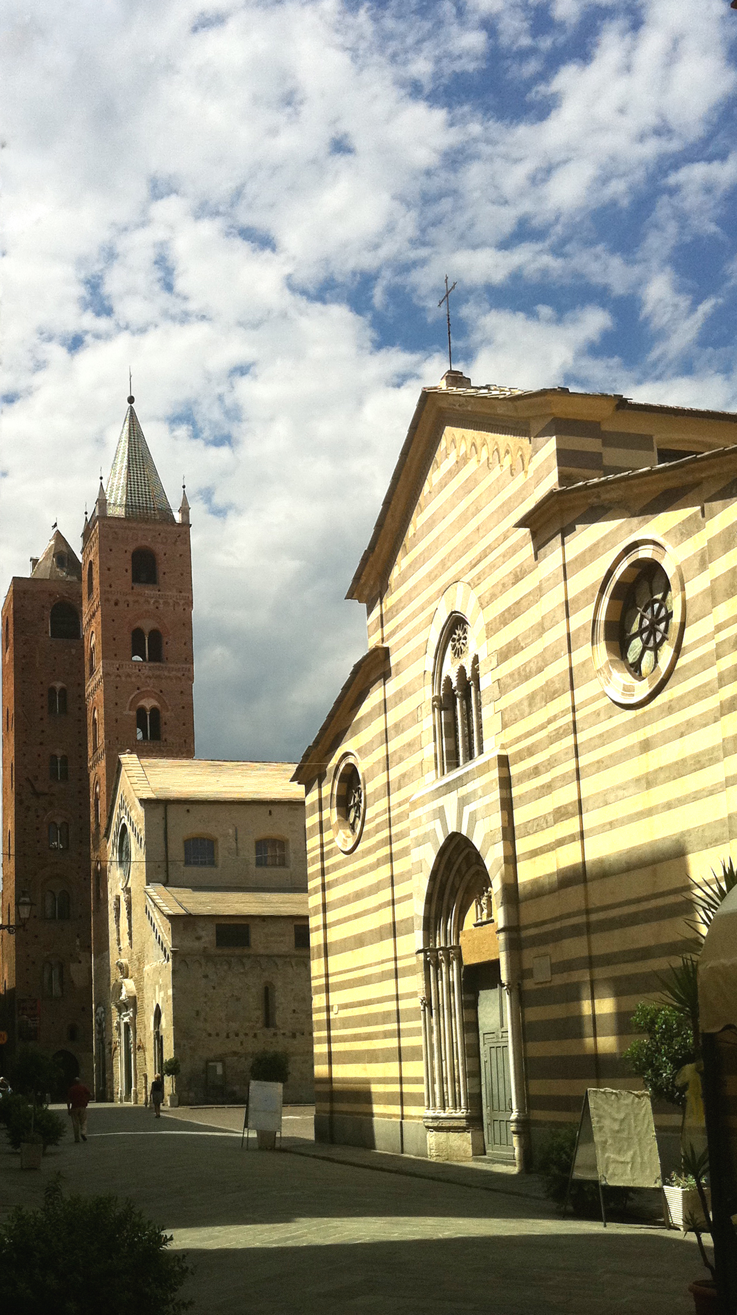 Vista di Santa Maria in Fontibus e della cattedrale di San Michele Arcangelo sullo sfondo assieme alle torri.